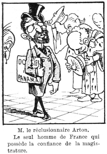 "Le Mois comique, par Moloch".